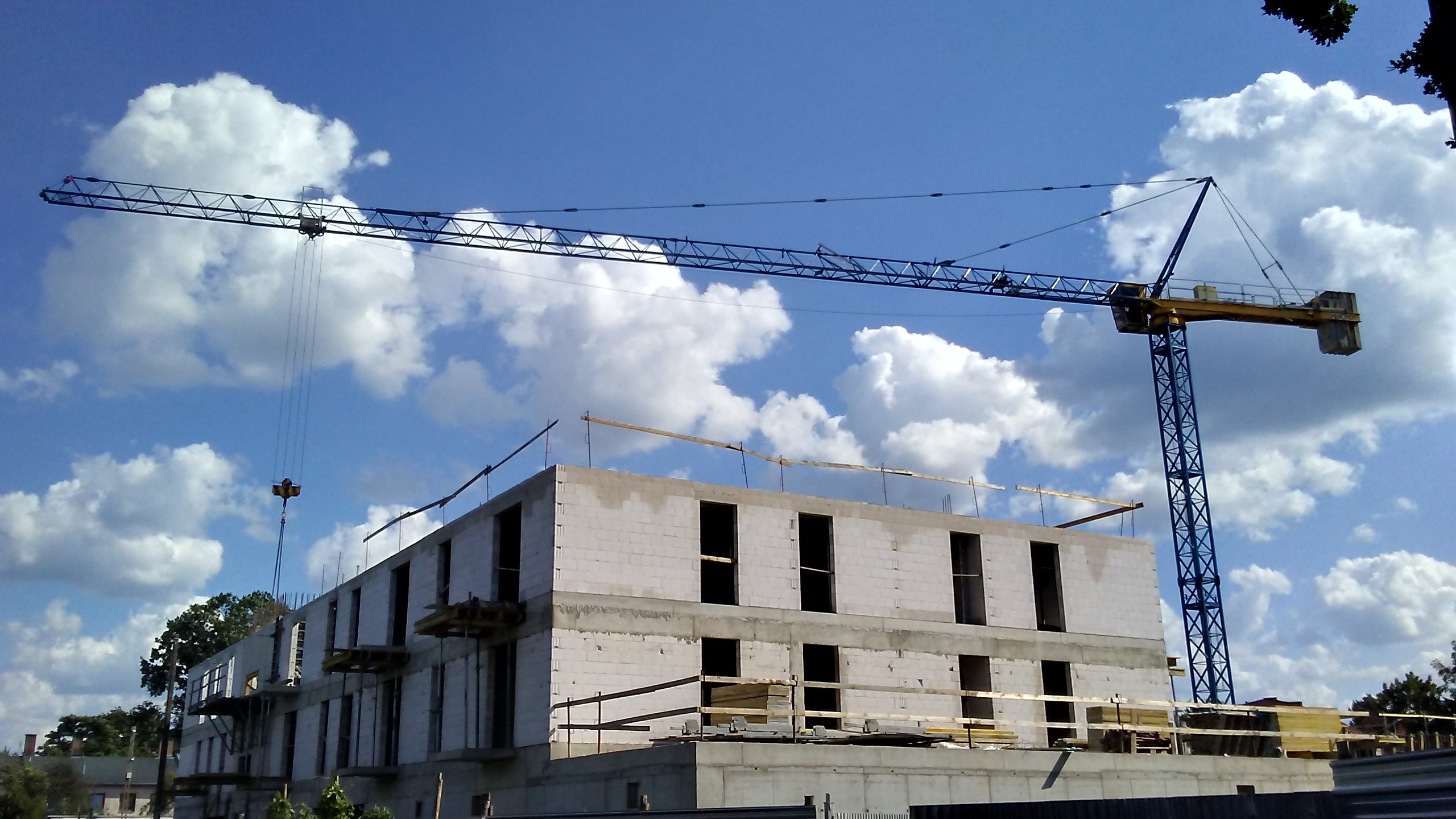 Program rządowy tanich mieszkań „Mieszkanie +”, blok mieszkalny przy ulicy Borek w Tomaszowie Mazowieckim